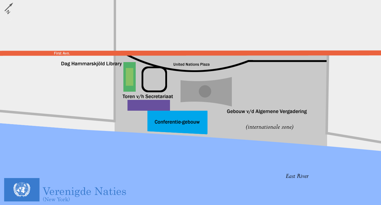 Zelfgemaakt op basis van een luchtshot. Hierbij deponeer ik deze plattegrond in het publiek domein.